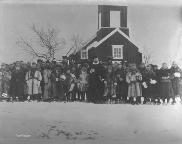 Prest og kyrkjelyd framom gamle Kautokeino kyrkje(1701-1944)